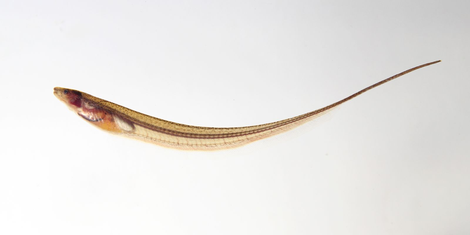 Gymnorhamphichthys sp.